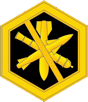 Малая эмблема воинских частей Федерального управления по безопасному хранению и уничтожению химического оружия, Россия